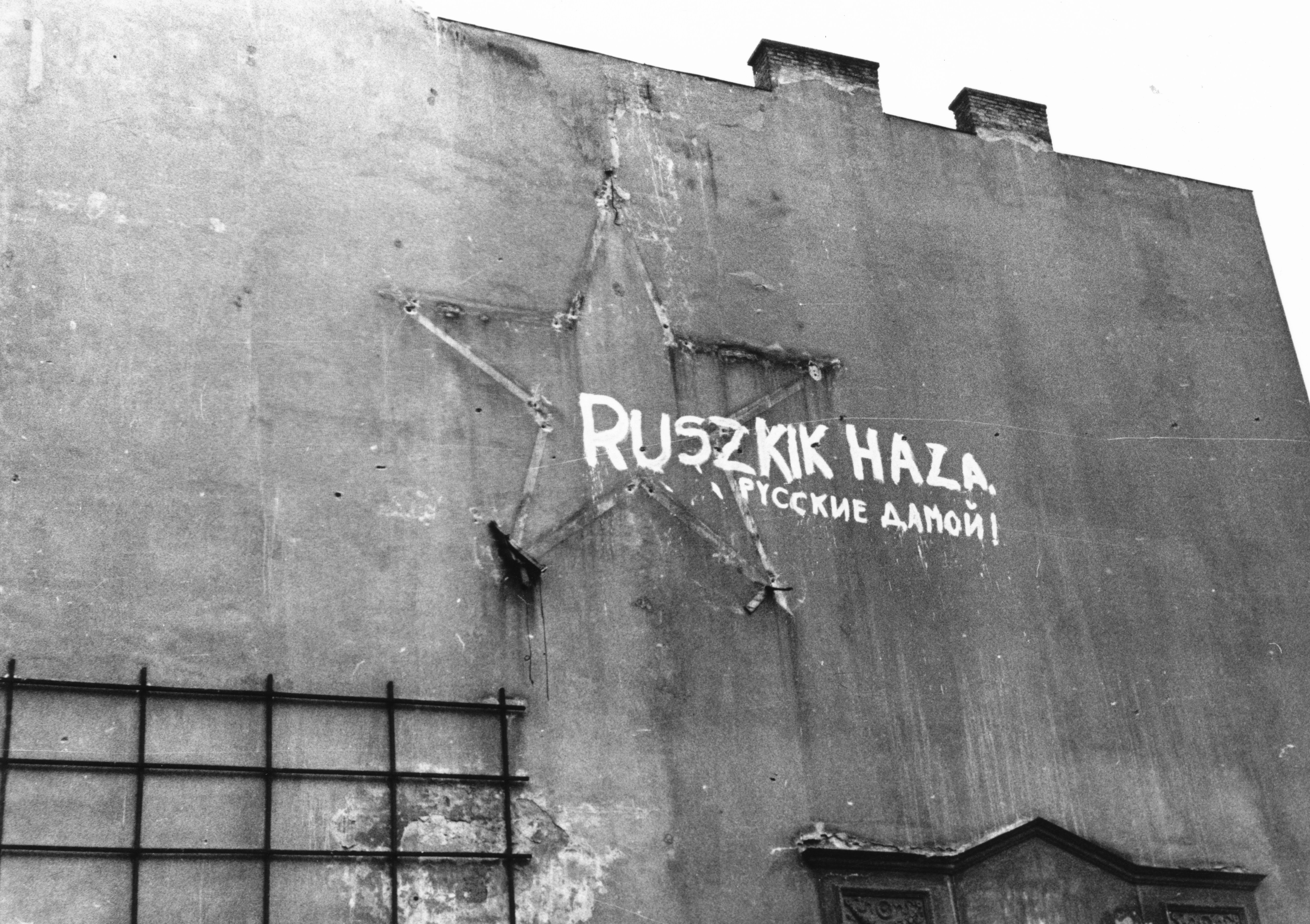 Kálvin tér. Location: Hungary, Budapest VIII. Tags: label, Red Star, Budapest, revolution Title: Kálvin tér.